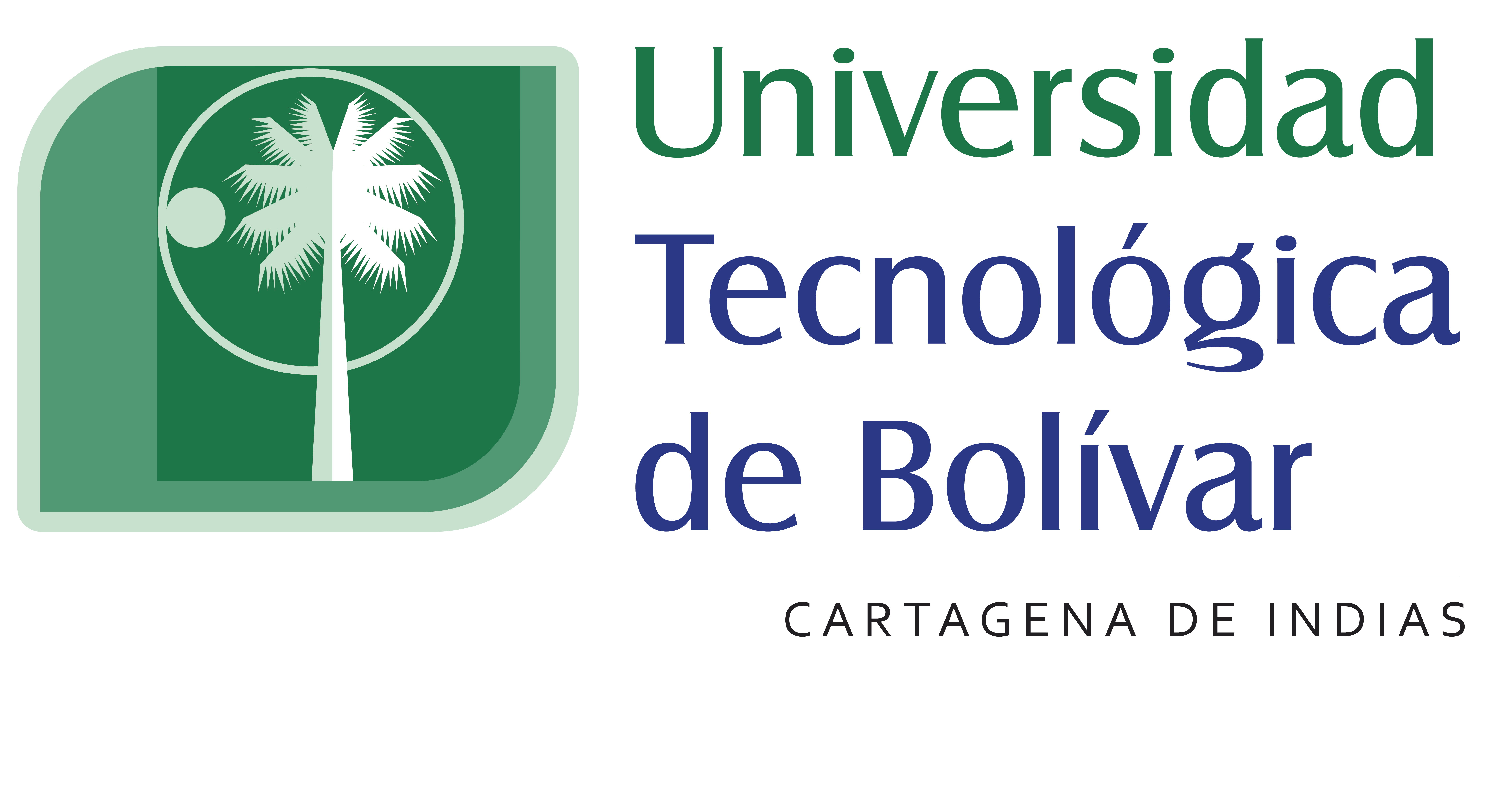 Logo Universidad Tecnológica de Bolívar